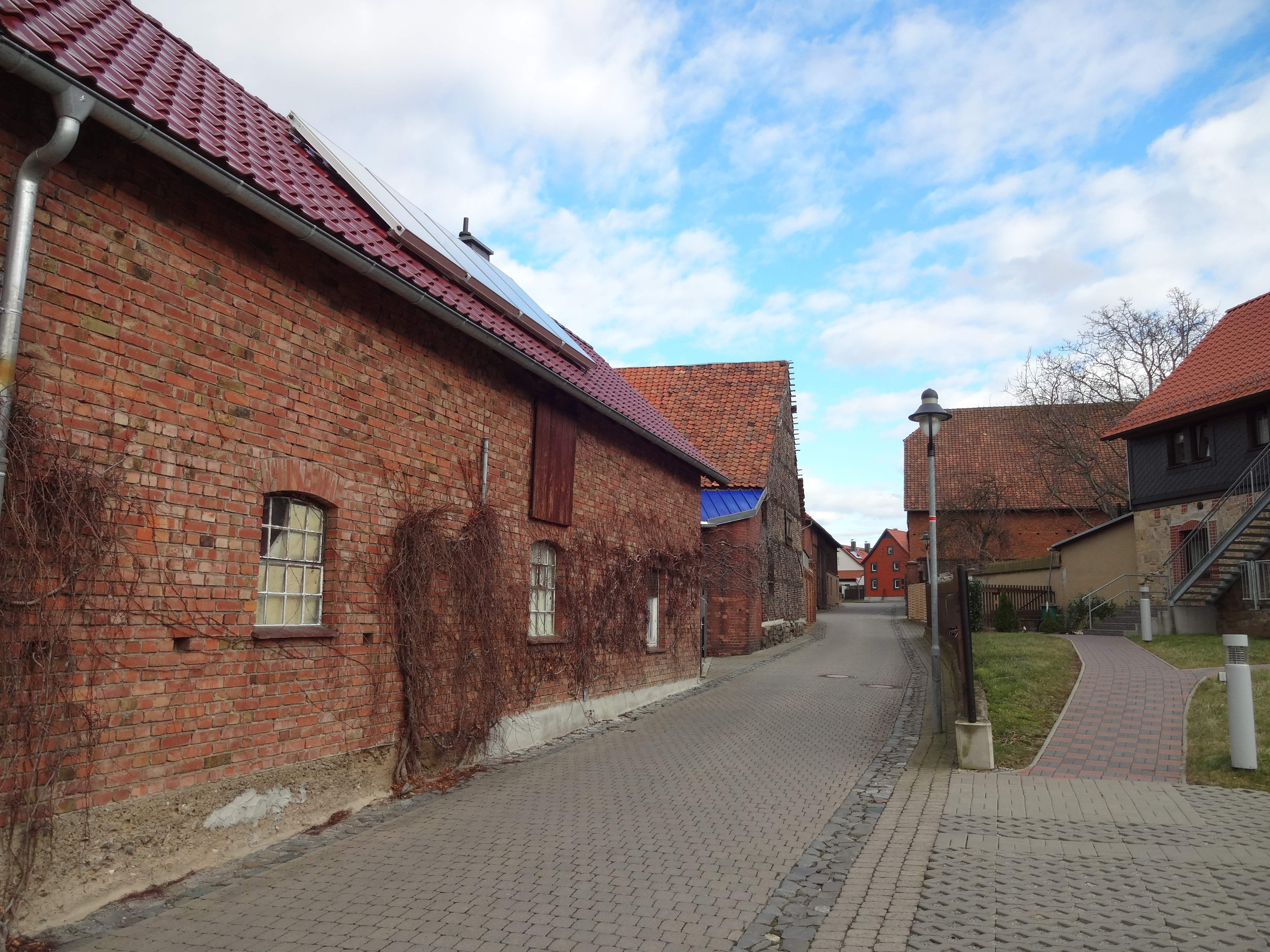 Kulturdenkmal Straßenzeile in der Müllergasse 2, 3, 4, 5 in Silstedt, Ortsteil von Wernigerode